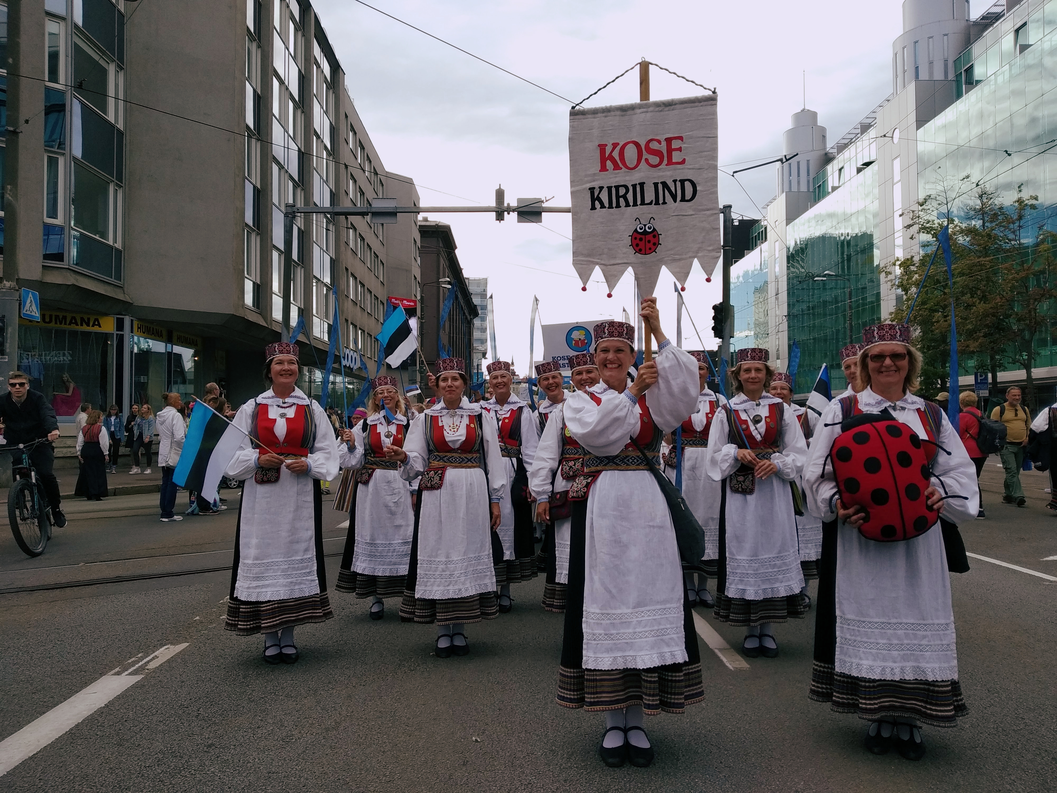 Kose Kirilind 2019. aasta laulu- ja tantsupeo rongkäigus.